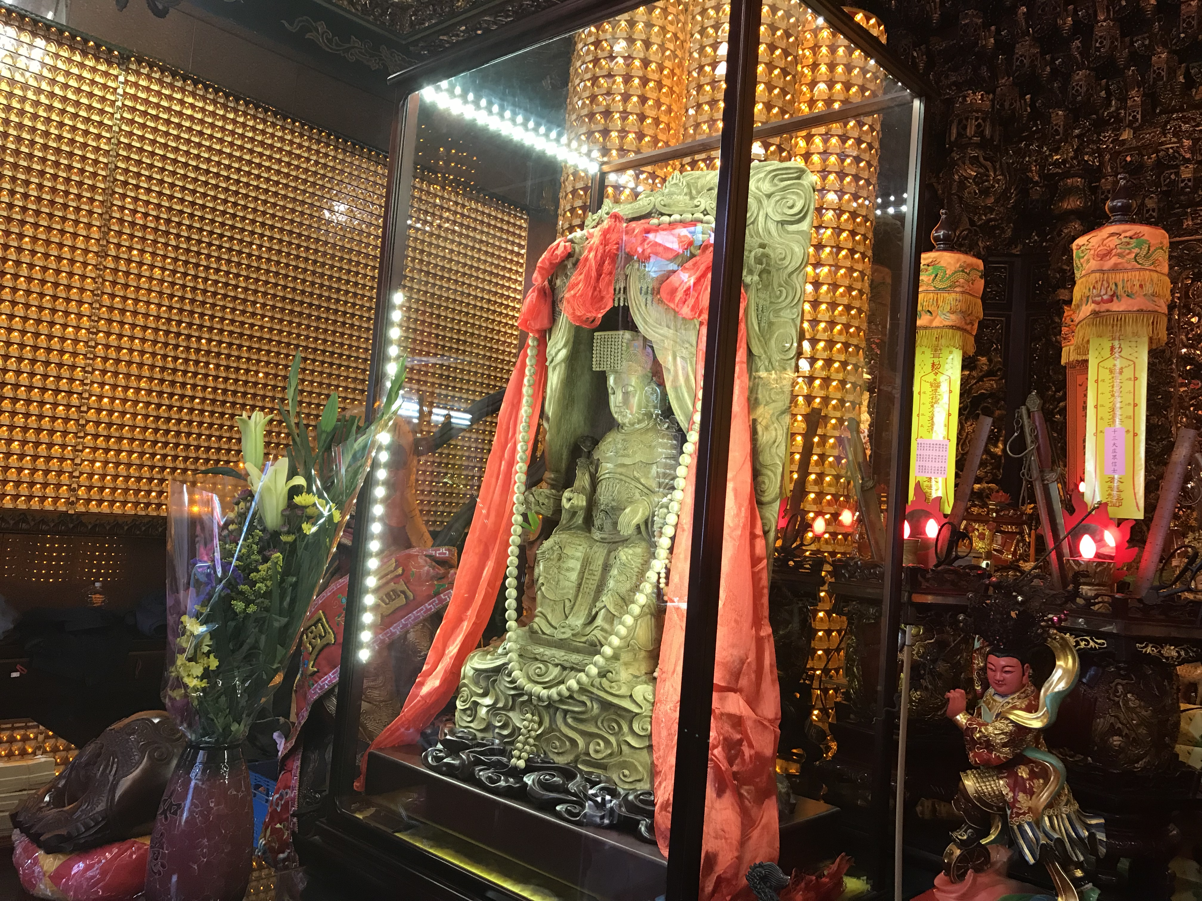 中壢仁海宮沉香媽祖